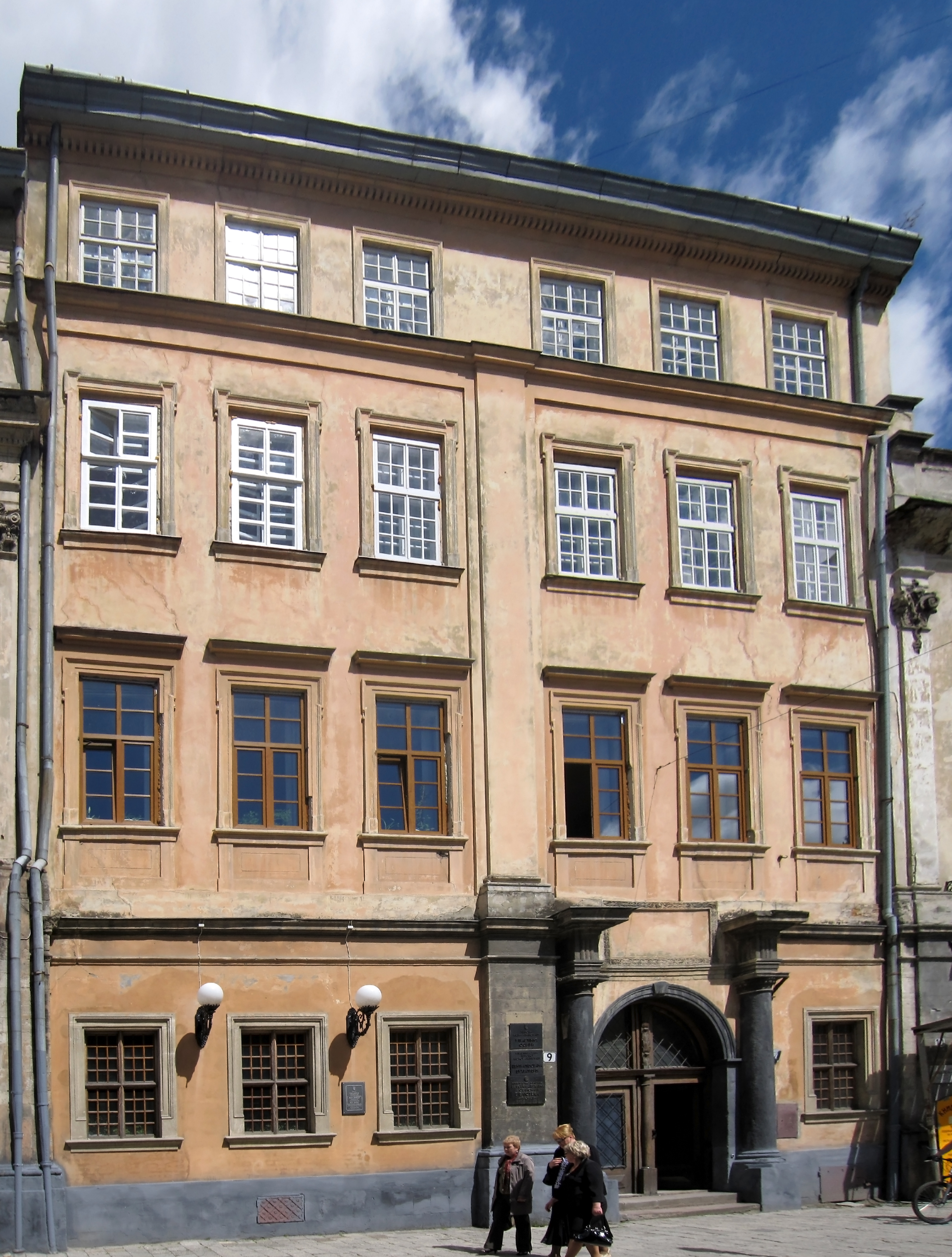 Rynek of LwowRynek of Lwow